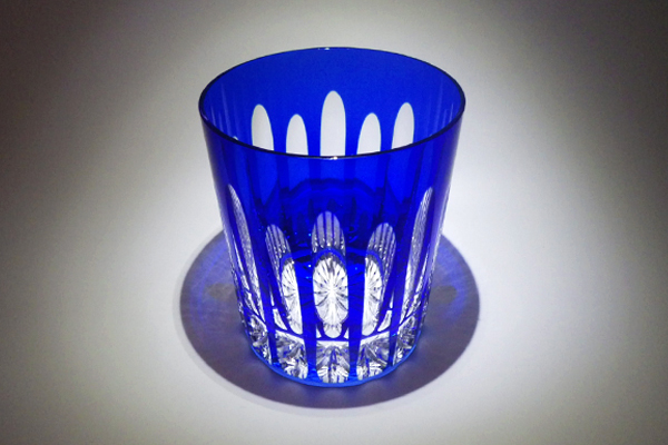 販売されていた天満切子のグラス 撮影者：Japanese Style Production 作成日：2018/04 撮影場所：自室スタジオ